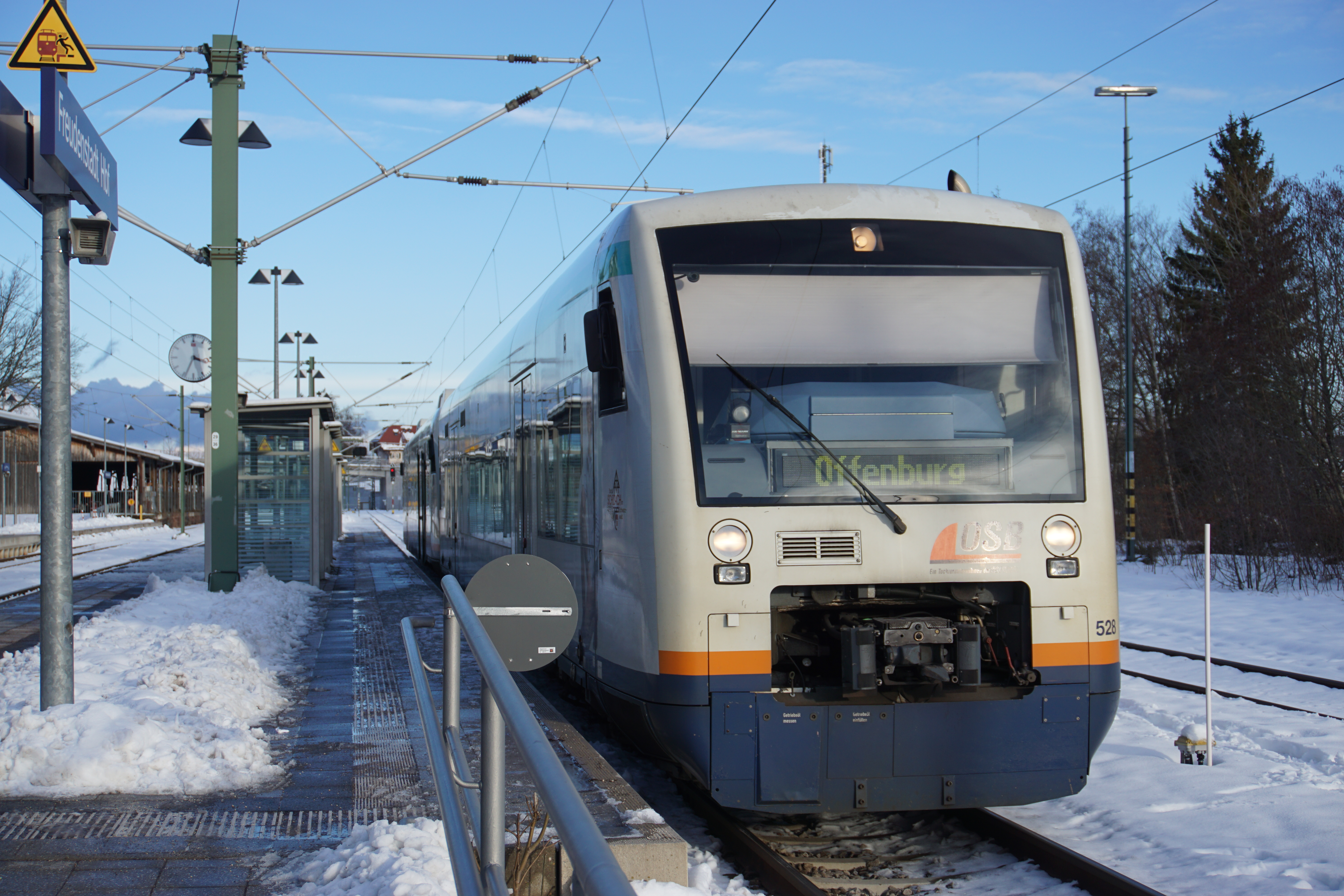 RS 1 der OSB in Freudenstadt Hbf